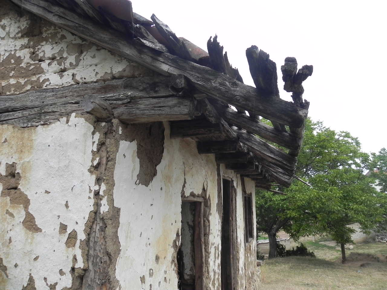 The house of Ajet Koka